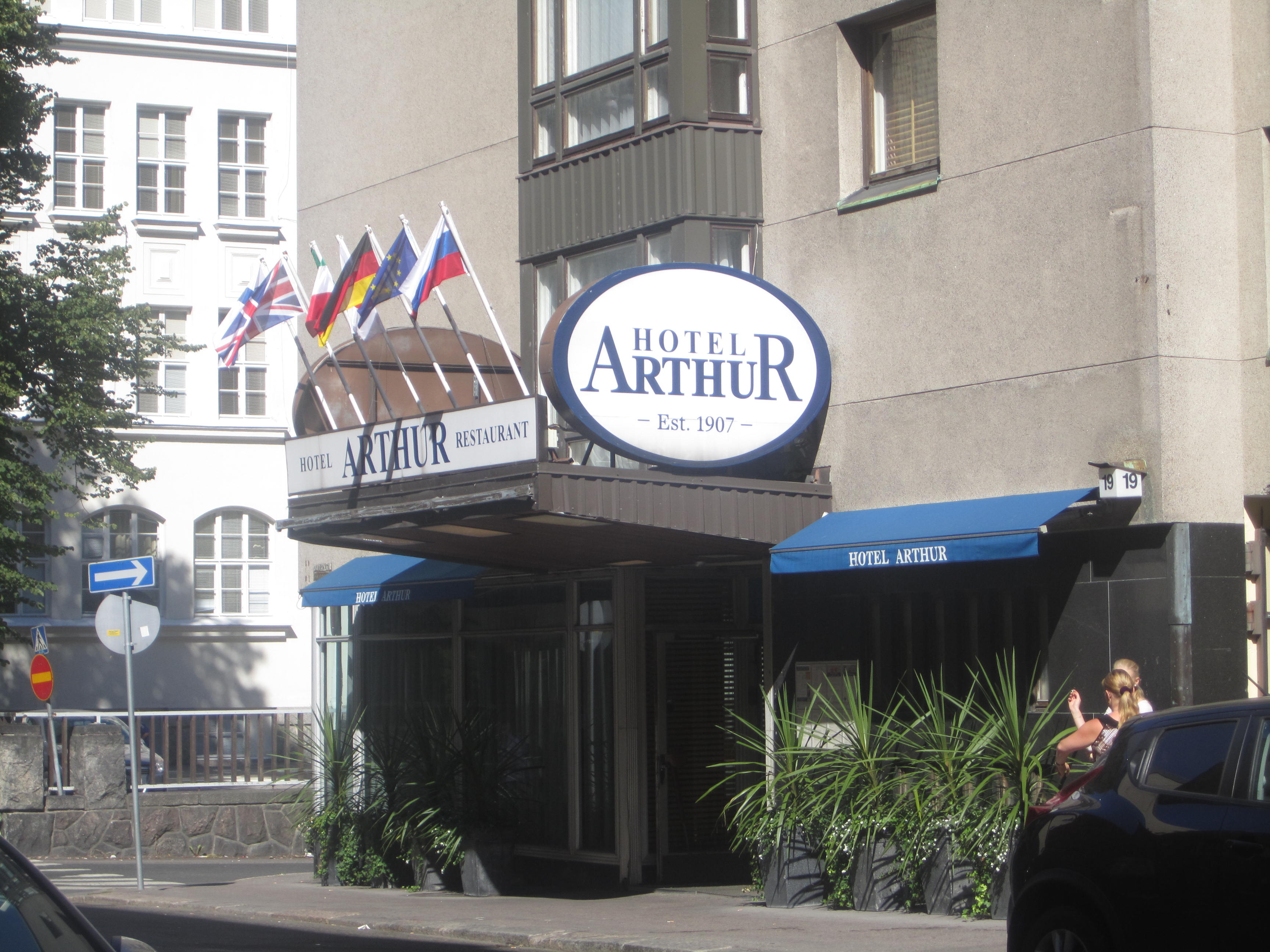 Hotel Arthur -hotelli Helsingissä.